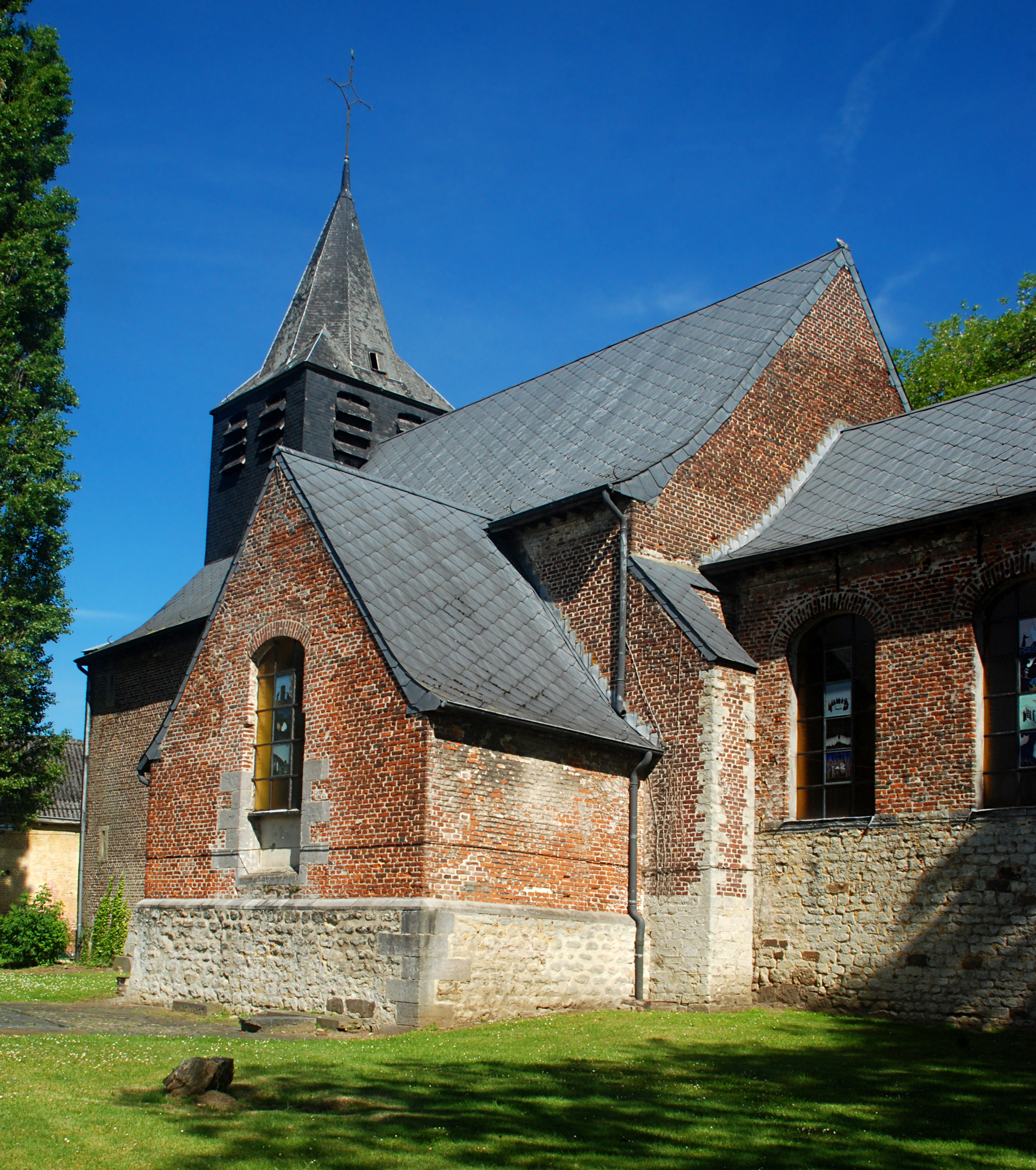 Belgique - Brabant wallon - Genappe - Glabais - Église Saint-Pierre